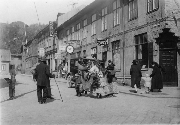 En romsk grupp passerar på gatan. Personerna tilhör den romska gruppen Khelderash som i slutet av 1800-talet invandrade till Sverige från olika delar av Europa, framförallt Östereuropa. Information i samtal 2015 med Monica Caldaras, Romska Kulturcentret i Malmö.